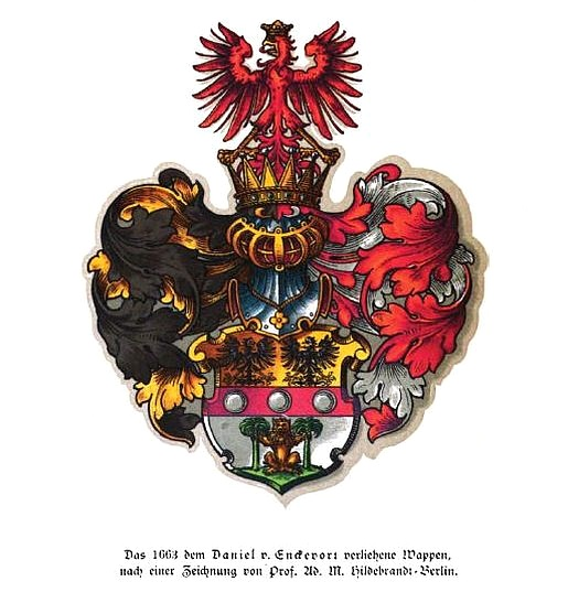 Das Wappen der deutschen Linie der Adelsfamilie von Enckevort aus dem Jahre 1663 Datum: 1663 Urheber: unbekannter Herardiker Quelle: Link zum Bild